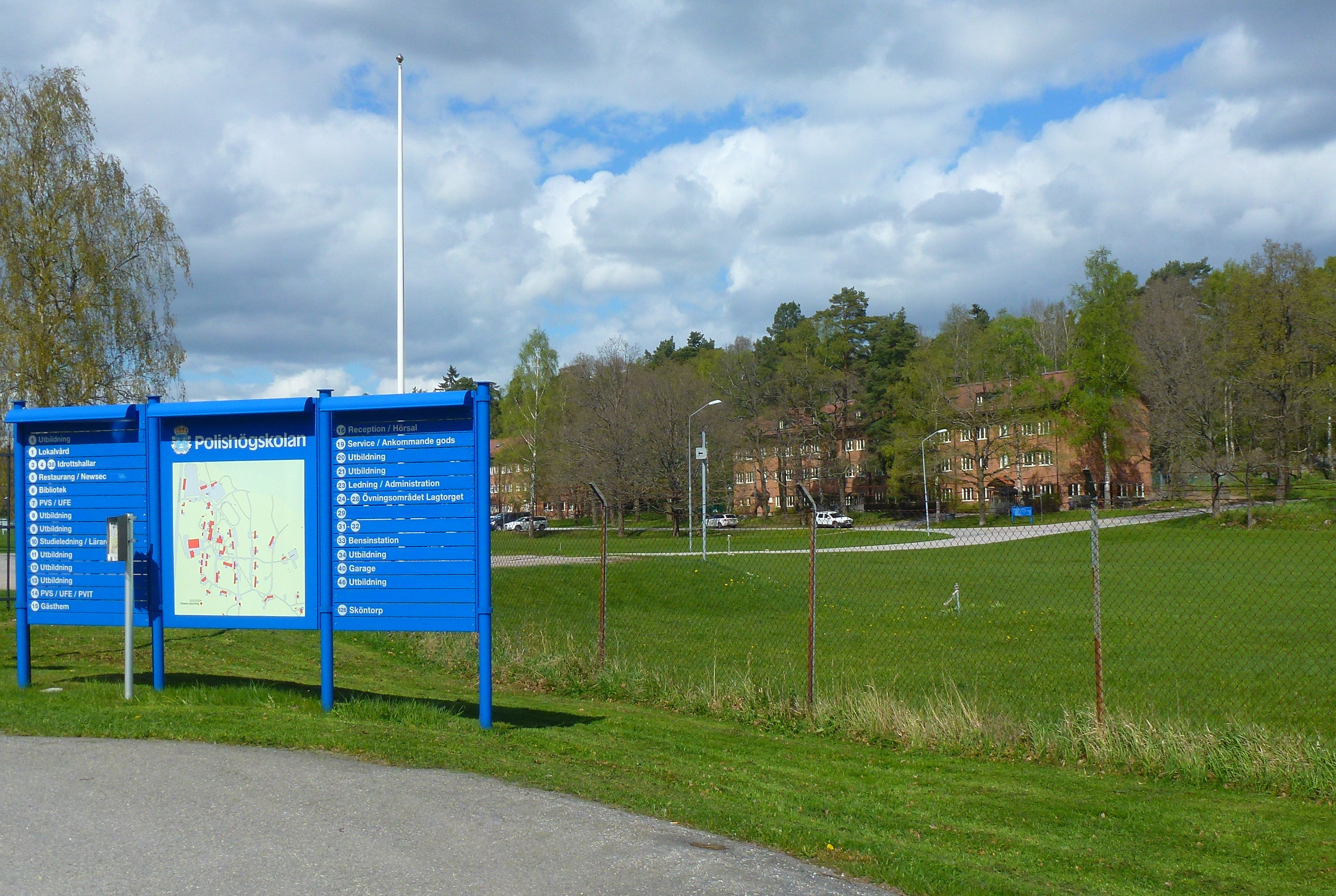 Polishögskolan, Sörentorp